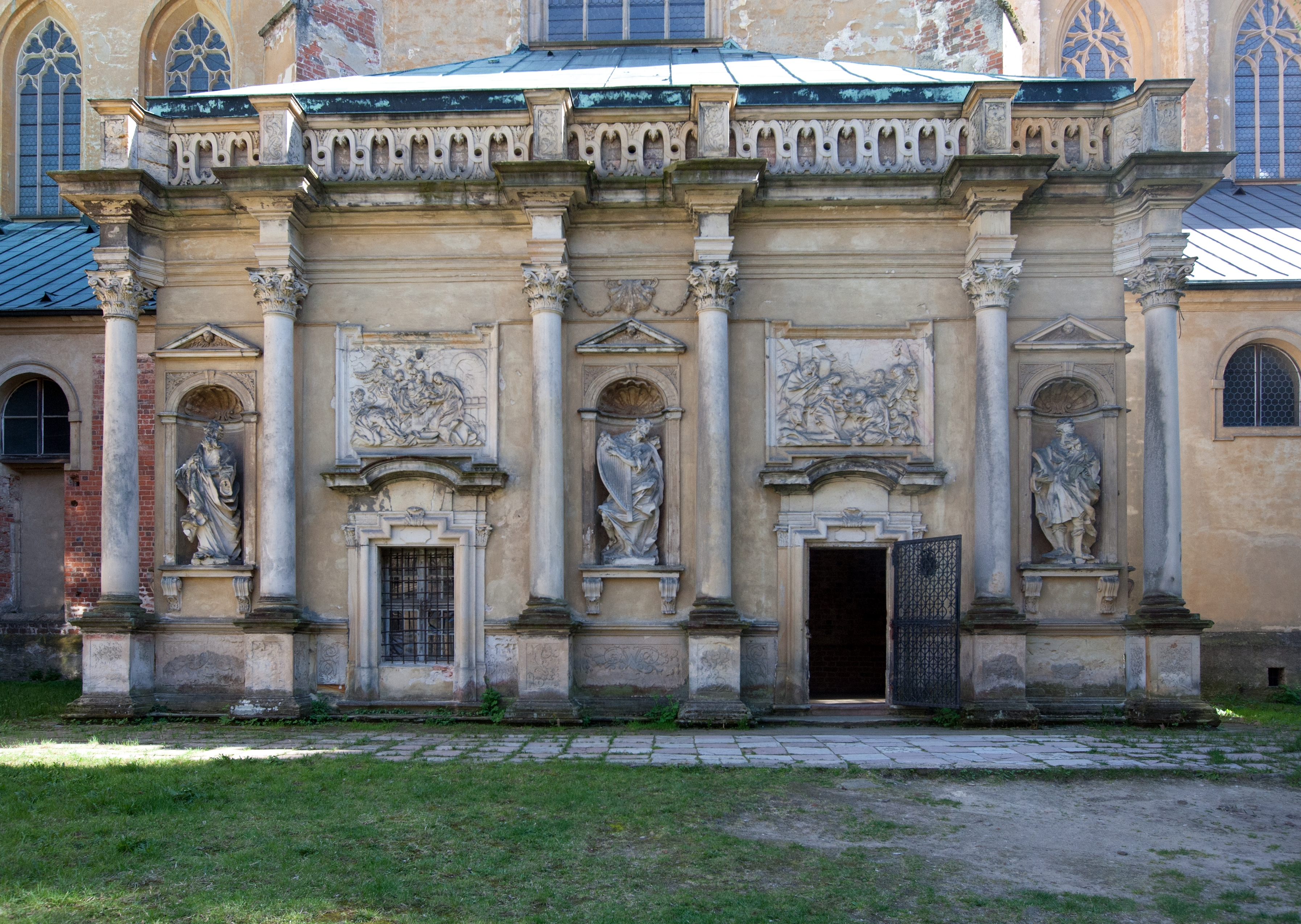 Opactwo cystersów w Lubiążu – Kaplica Loretańska